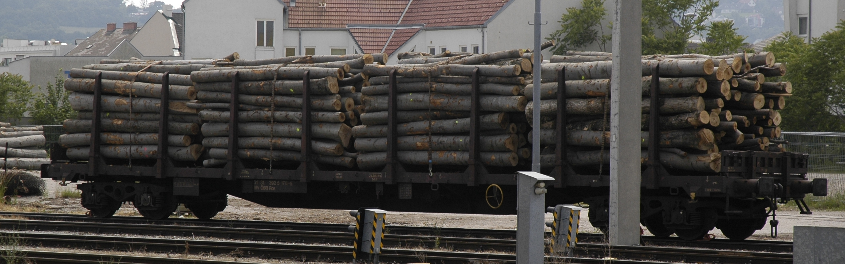 ÖBB 31 81 3925 178-5 mit Rundholz auf Rungenwagen verladen am Bahnhof Mödling